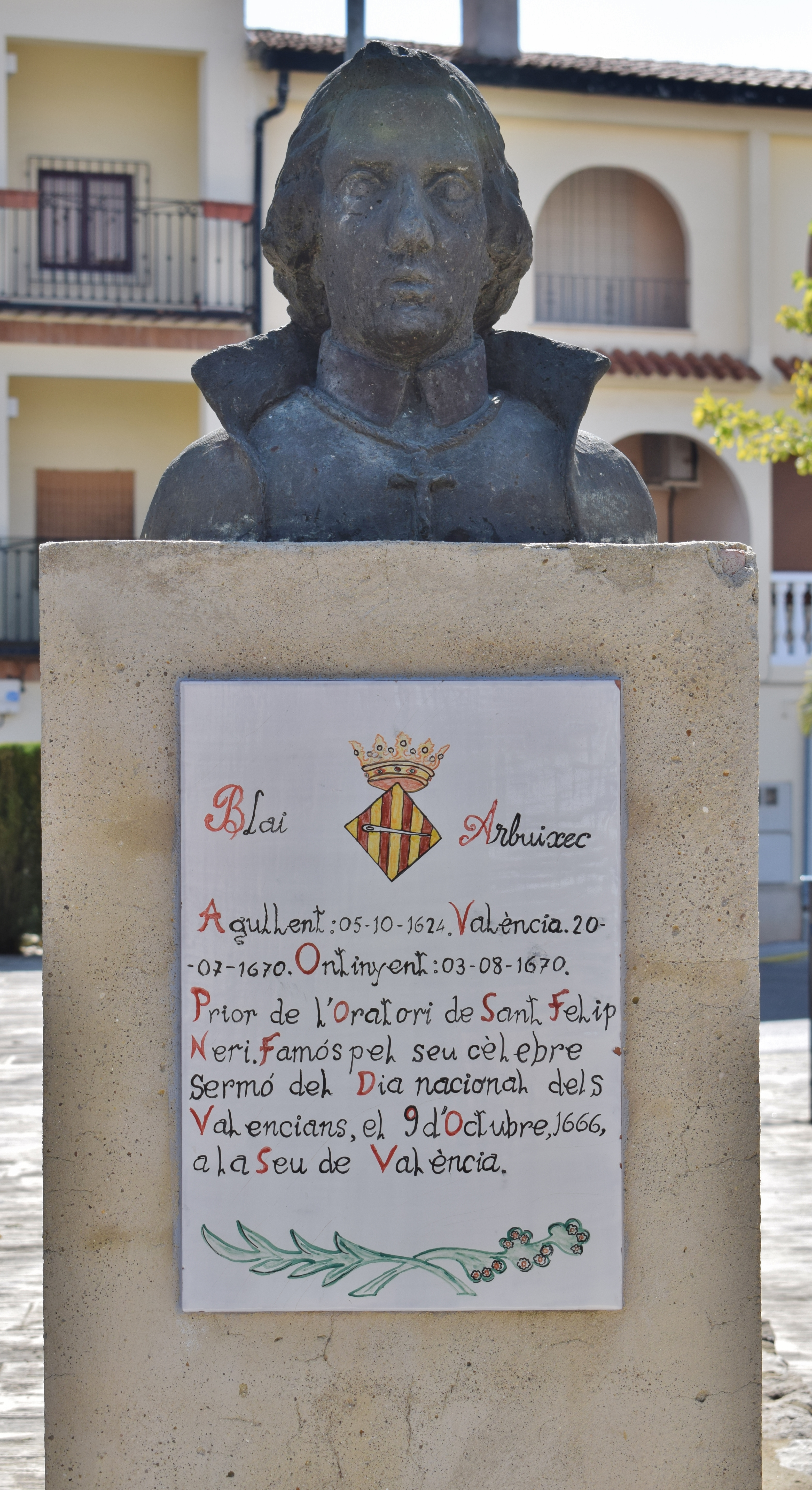 Agullent.